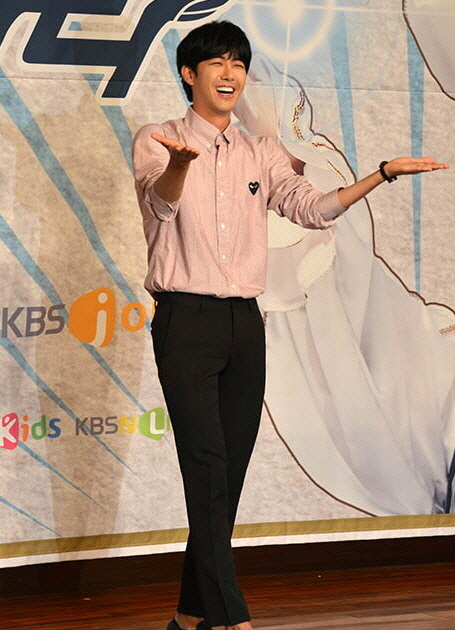 KBS N '청춘하라' 방송 기념 기자간담회